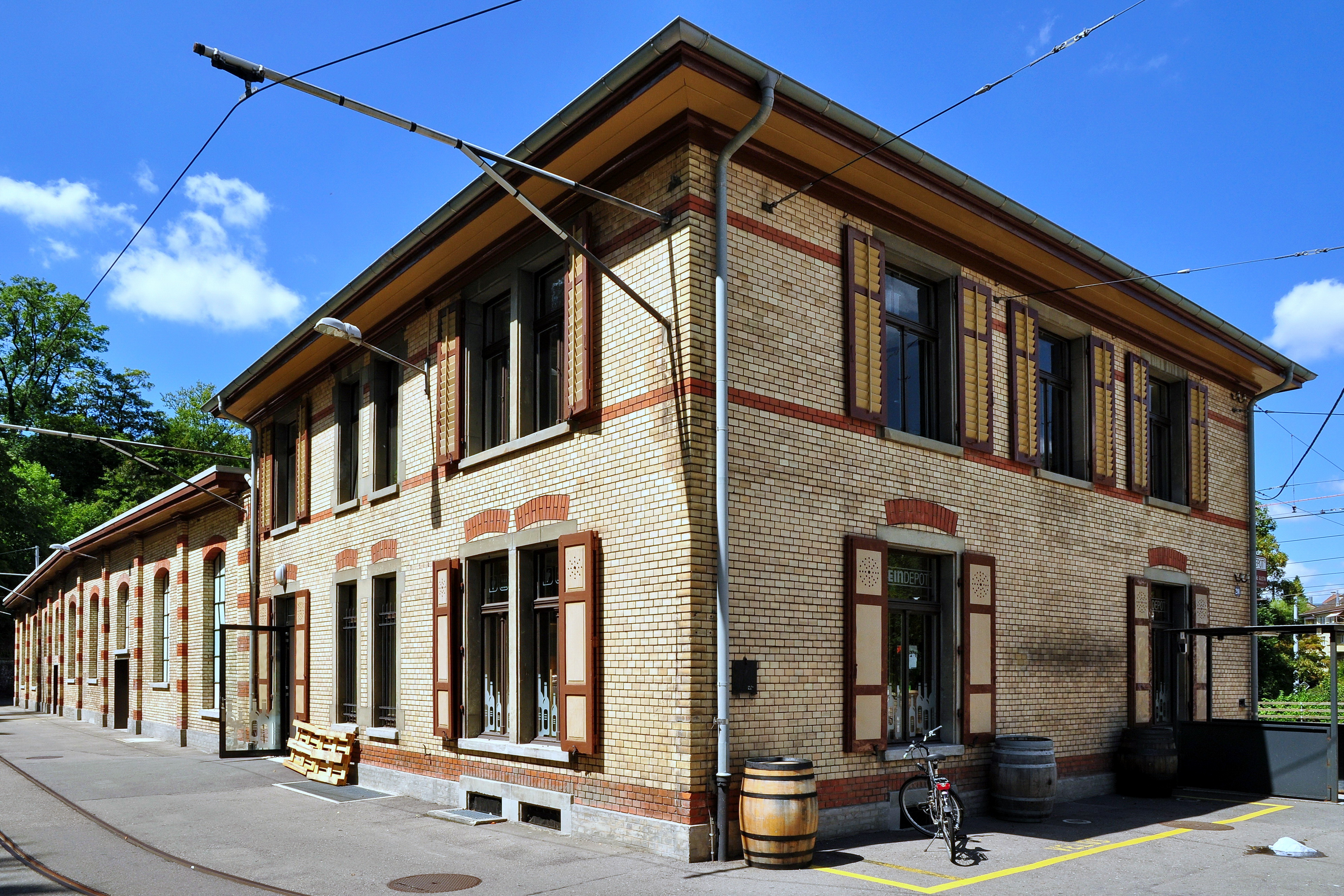 Tramdepot Burgwies in Zürich-Weinegg (Switzerland)